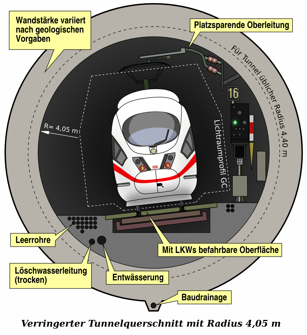 Tunnel-Sonderquerschnitt mit lichter Weite 8,10 m, wie er teilweise für die Tunnel im Bahnprojekt Stuttgart 21 geplant ist. Grundlage für die Grafik ist eine technische Darstellung in PFA 1.2 Fildertunnel Anlage 7.3.